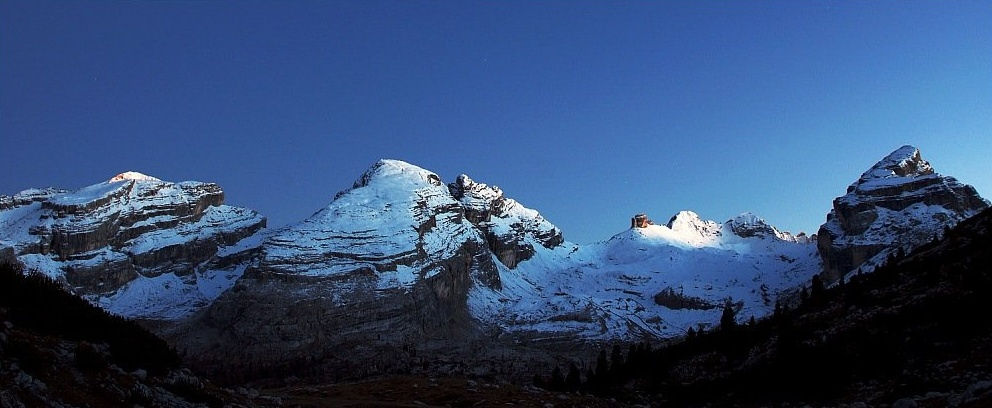 Aufnahmestandpunkt bei der Großen Fanesalm (Dolomiten). Links der südwestliche Teil des Monte del Vallon Bianco, dann Furcia-Rossa-Spitzen, Monte Castello, Monte Casale, Monte Cavallo und Nördliche Campestrinspitze.